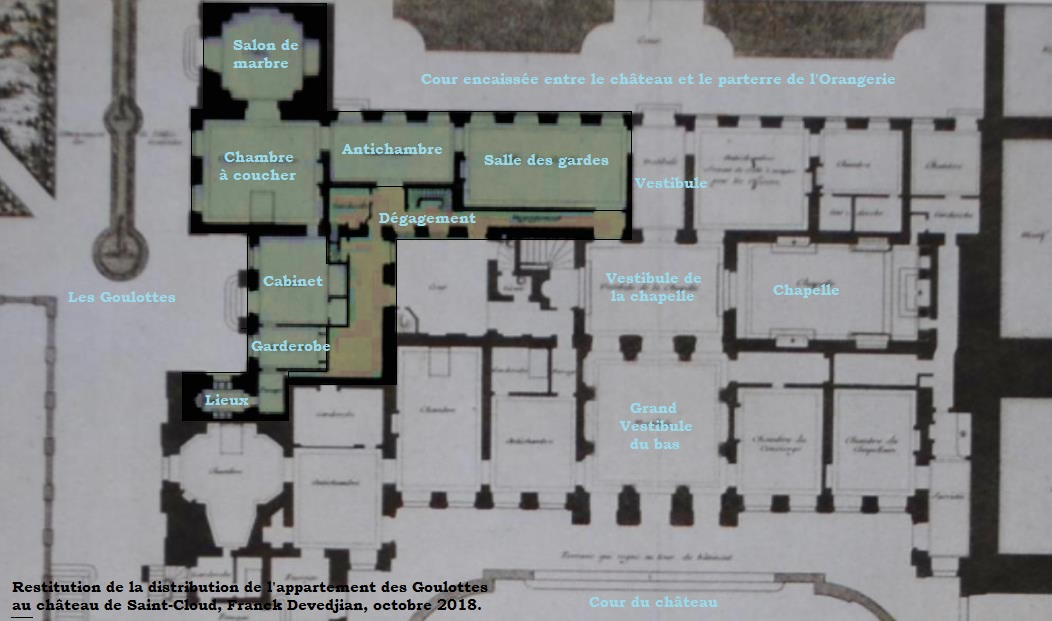 Distribution de l'appartement des Goulottes au rez-de-chaussée du château de Saint-Cloud. C'était l'appartement de la duchesse d'Orléans, épouse du Régent.